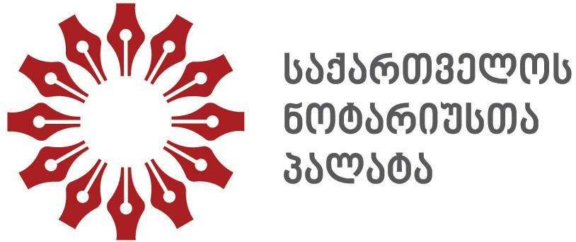 საქართველოს ნოტარიუსთა პალატის ლოგო